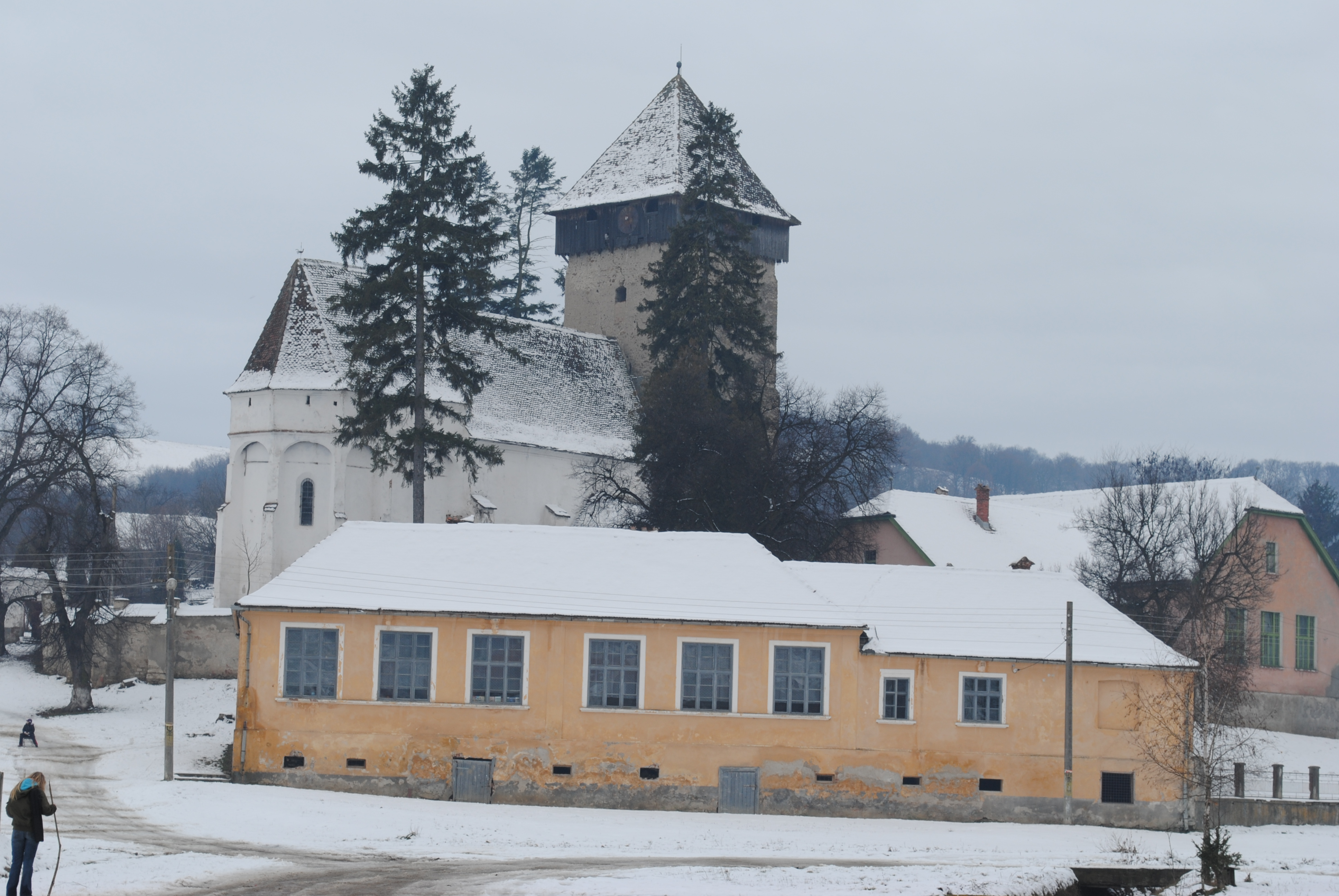 Ansamblul bisericii evanghelice fortificate, sec. XIII-XVI